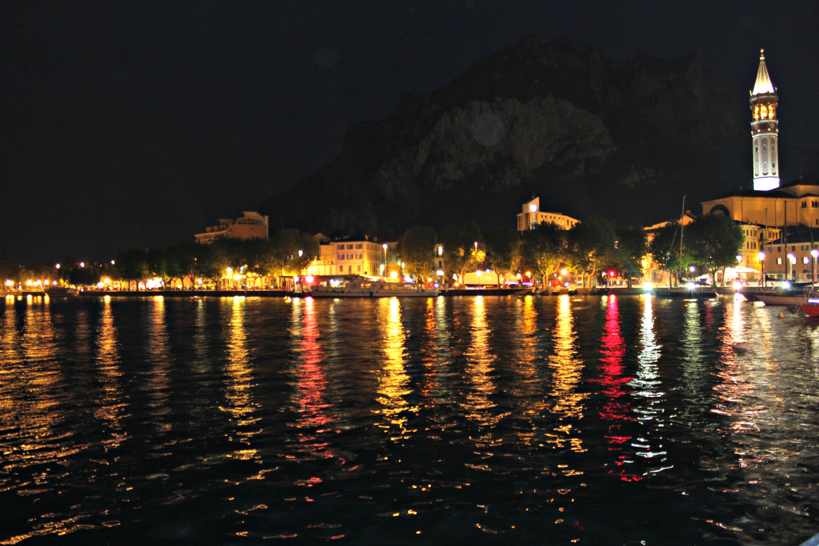 Inizia la notte a Lecco, il sole scende oltre l'orizzonte e si accendono le luci di questa meravigliosa città.